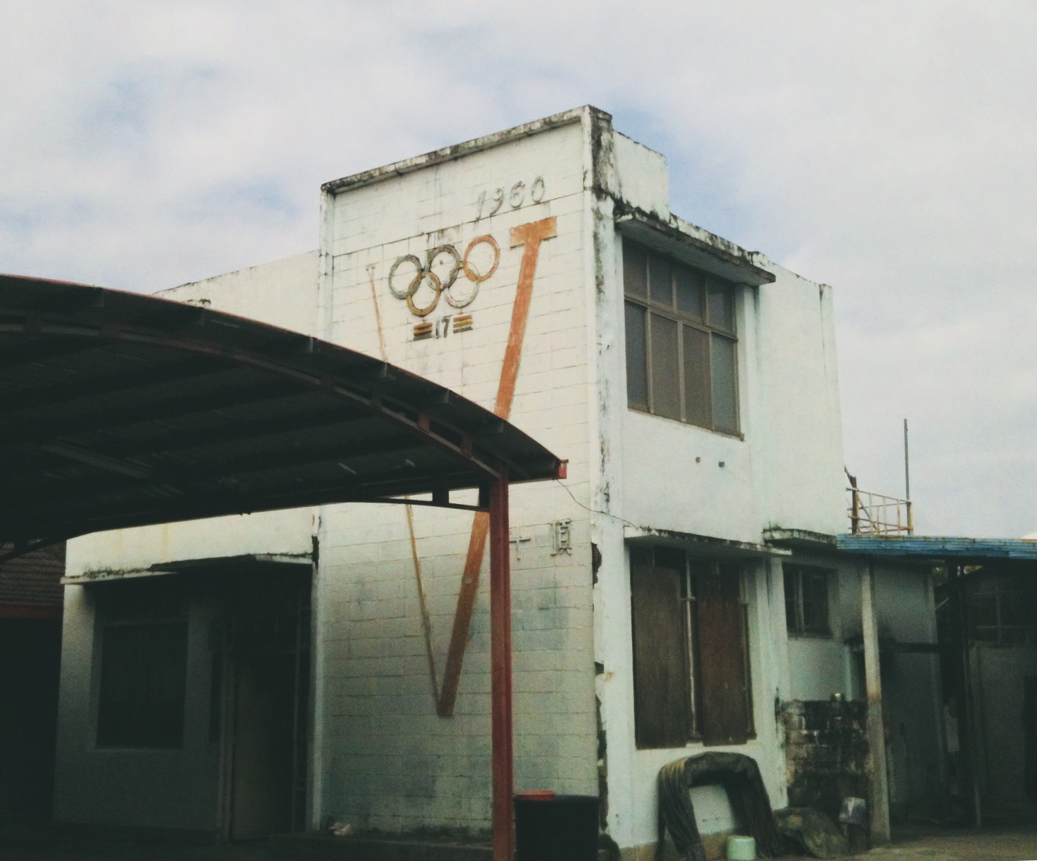 臺灣臺東縣臺東市的鐵人之家，為有亞洲鐵人之稱的楊傳廣之故居